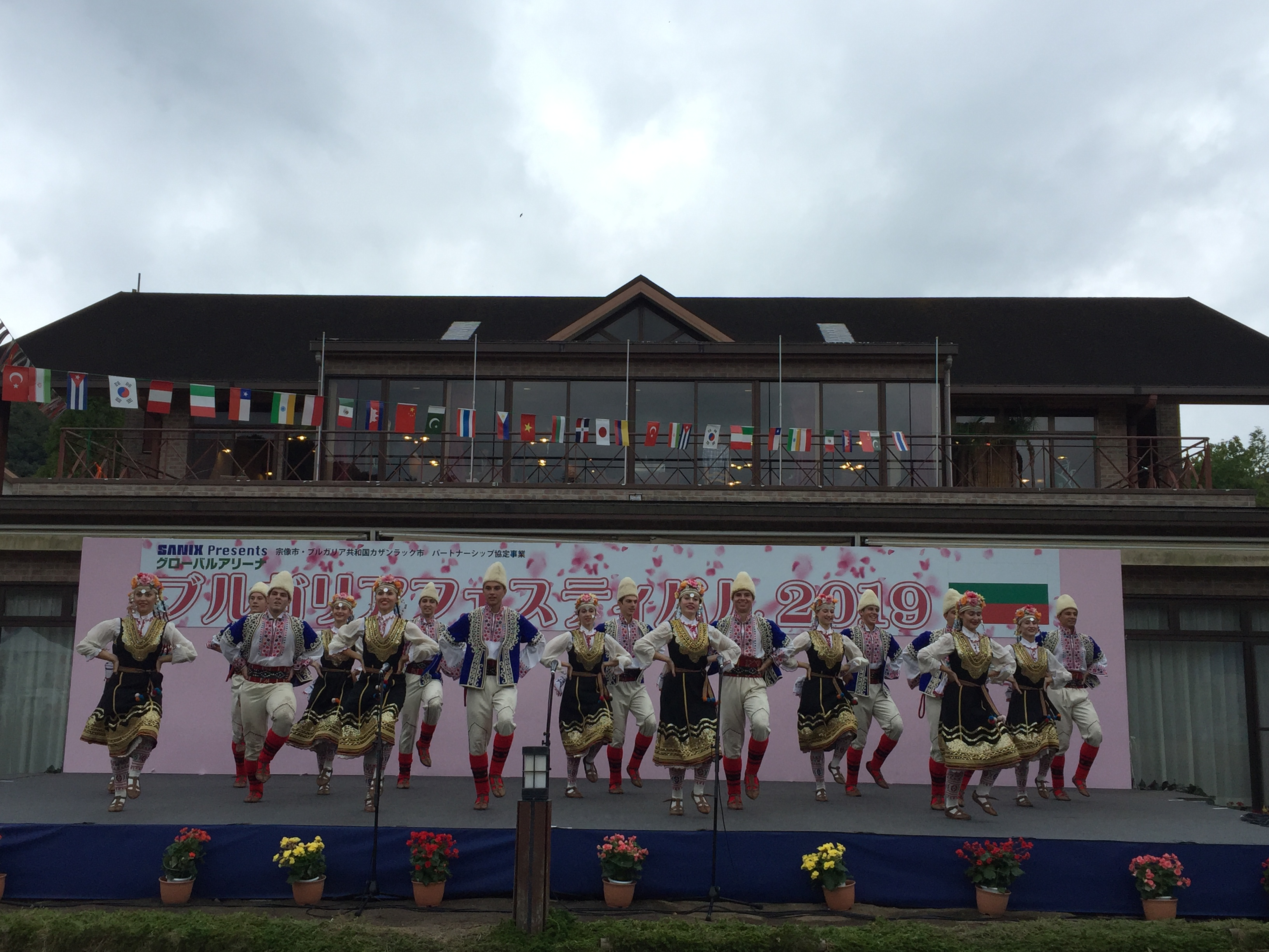 カザンラック民族舞踊団のステージ演奏（ブルガリアフェスティバル2019にて）